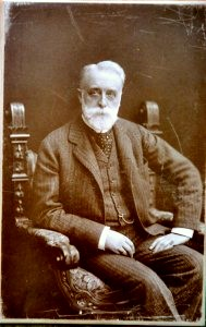 Scan eines Porträtfotos von Robert Suermondt, Bankier in Aachen